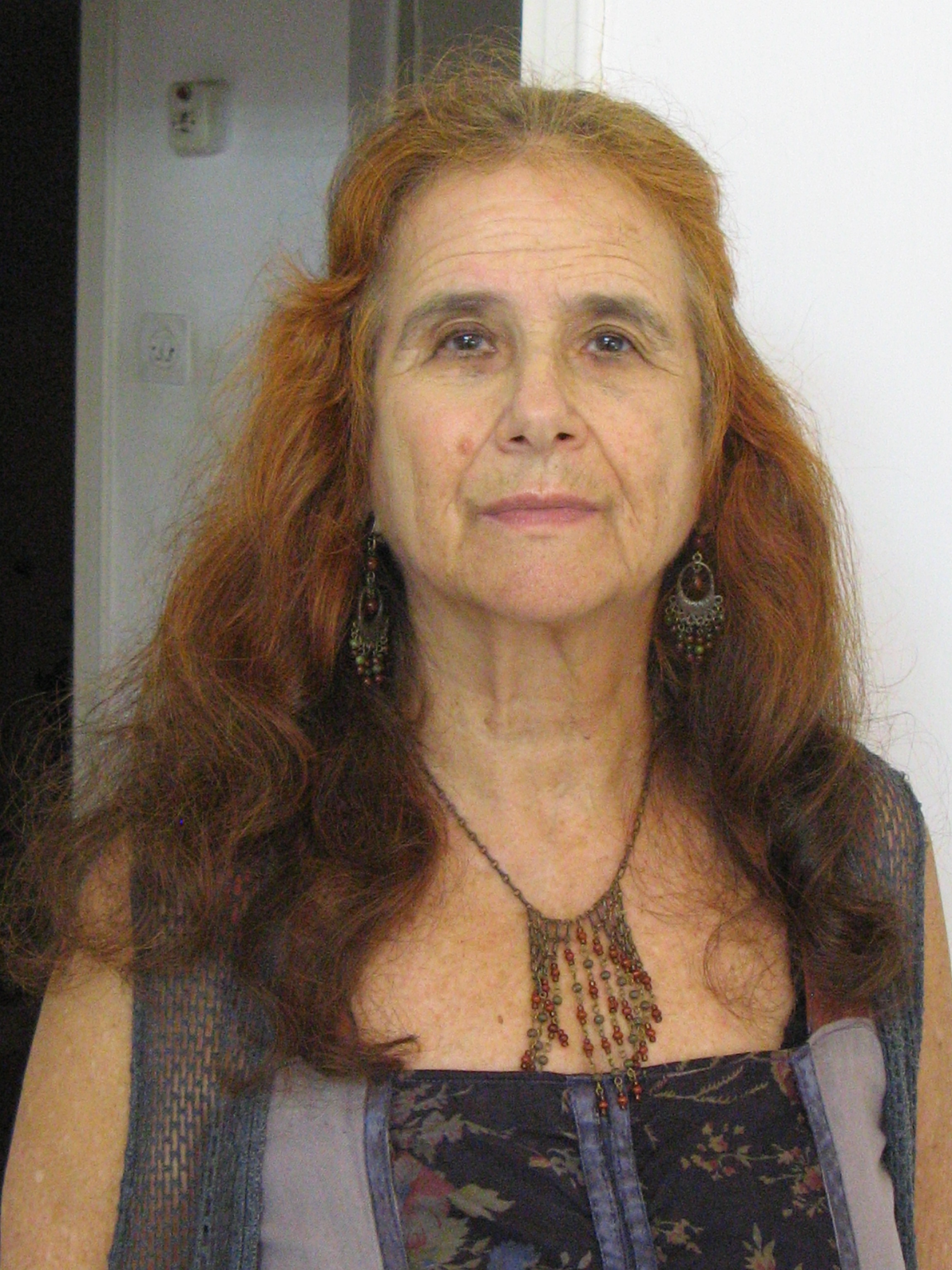 אילנה צמחוני